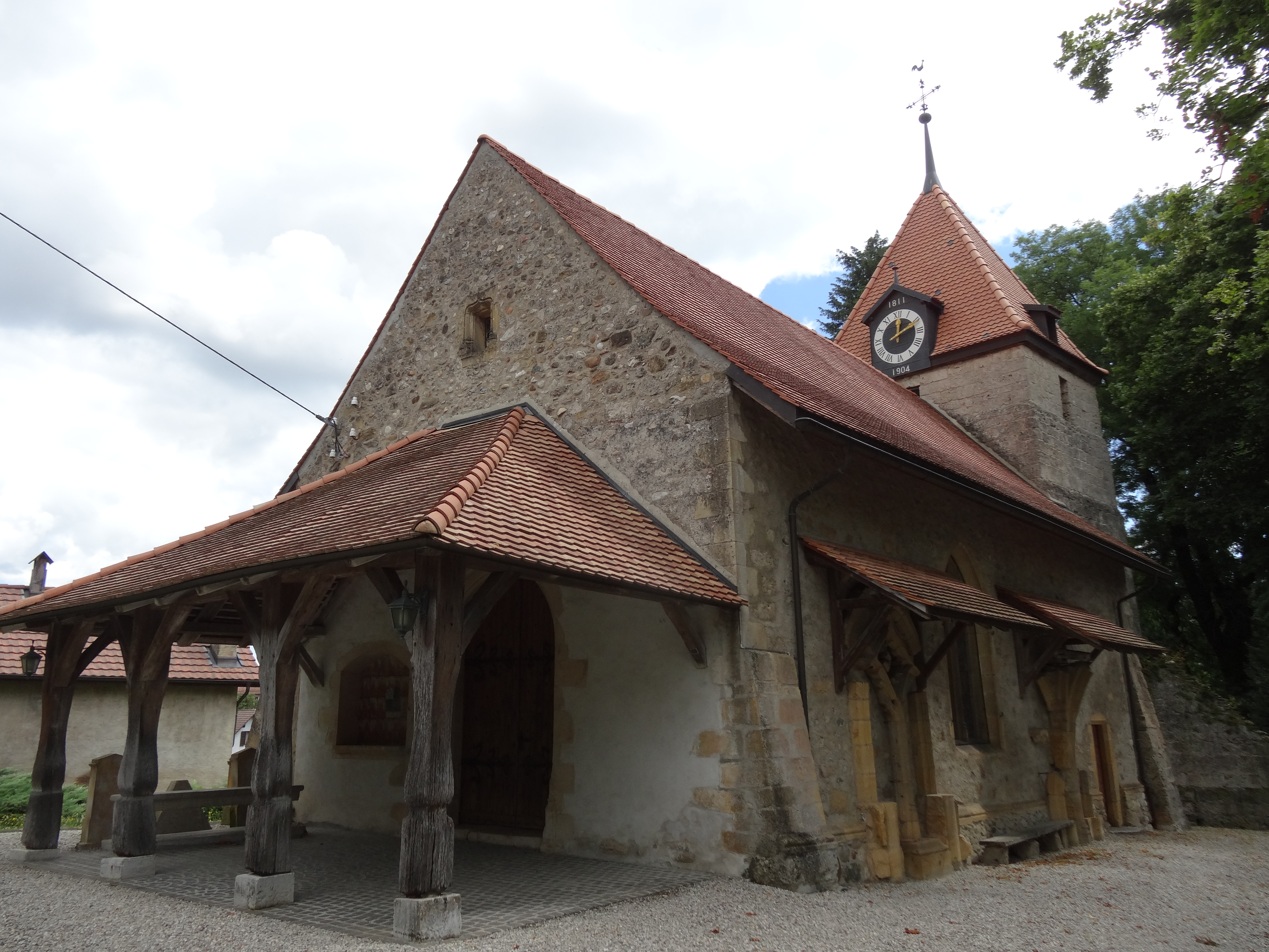 Giez, Le temple